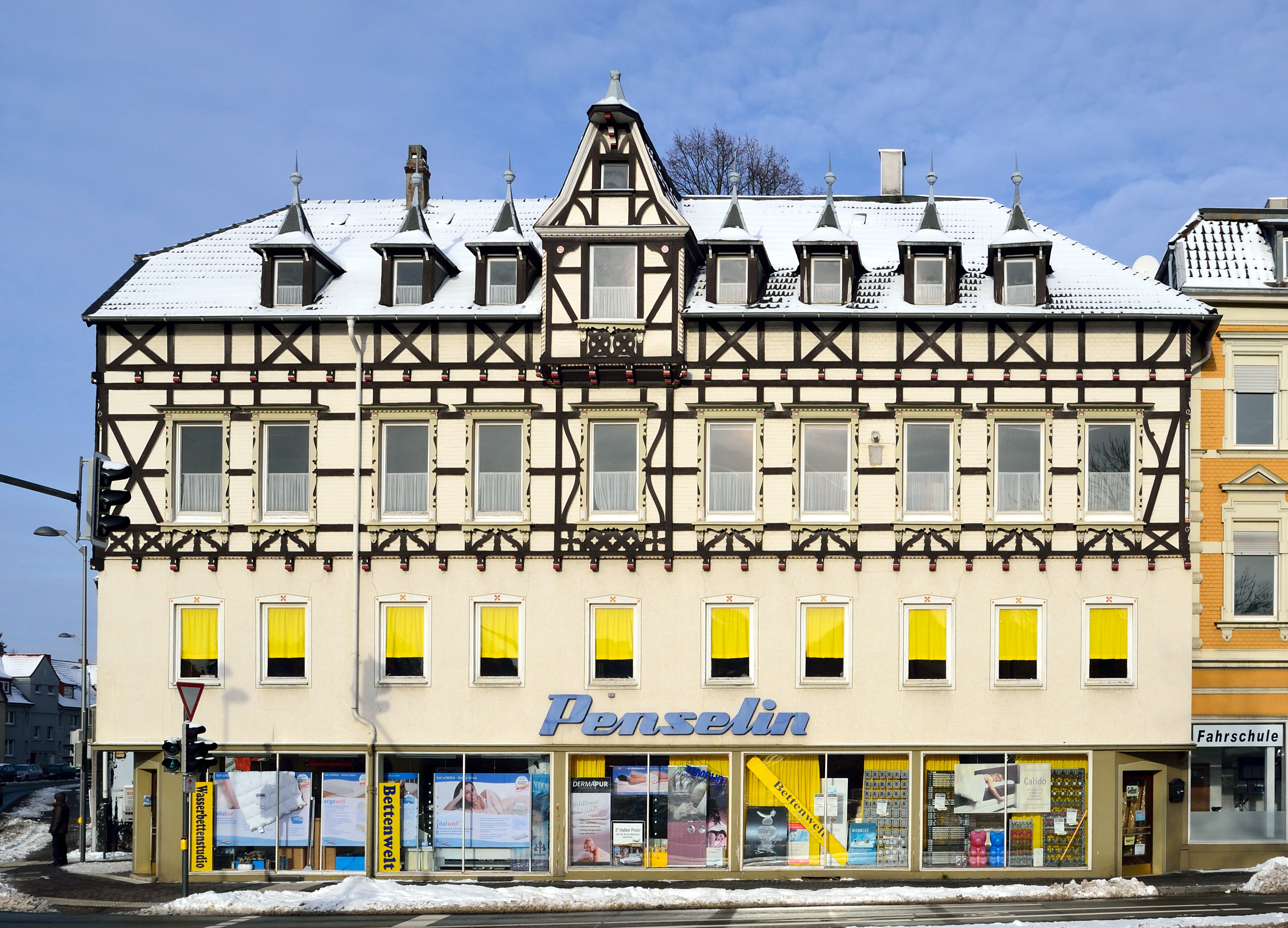 Geschäftshaus Richthofenstr. 2 in Detmold, ehemals Penselin